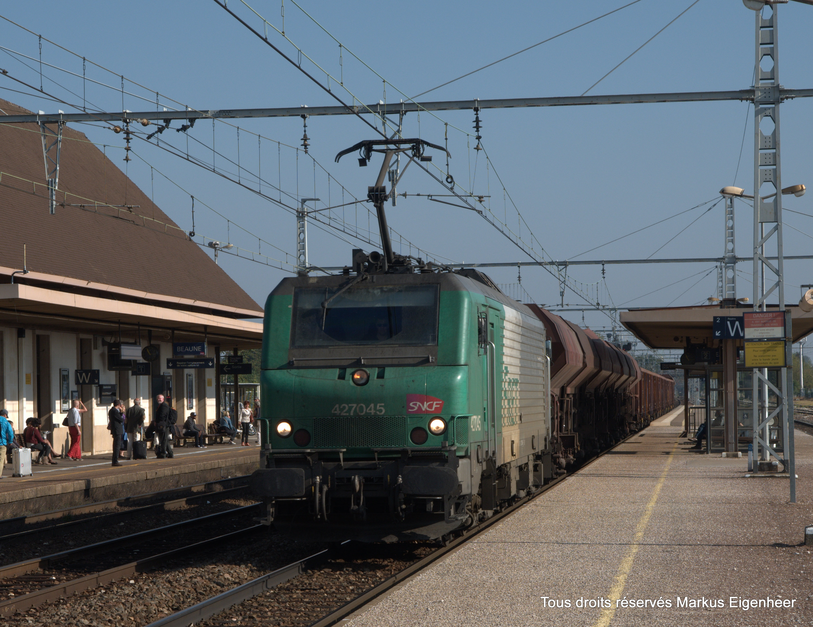 02.10.2014 Beaune